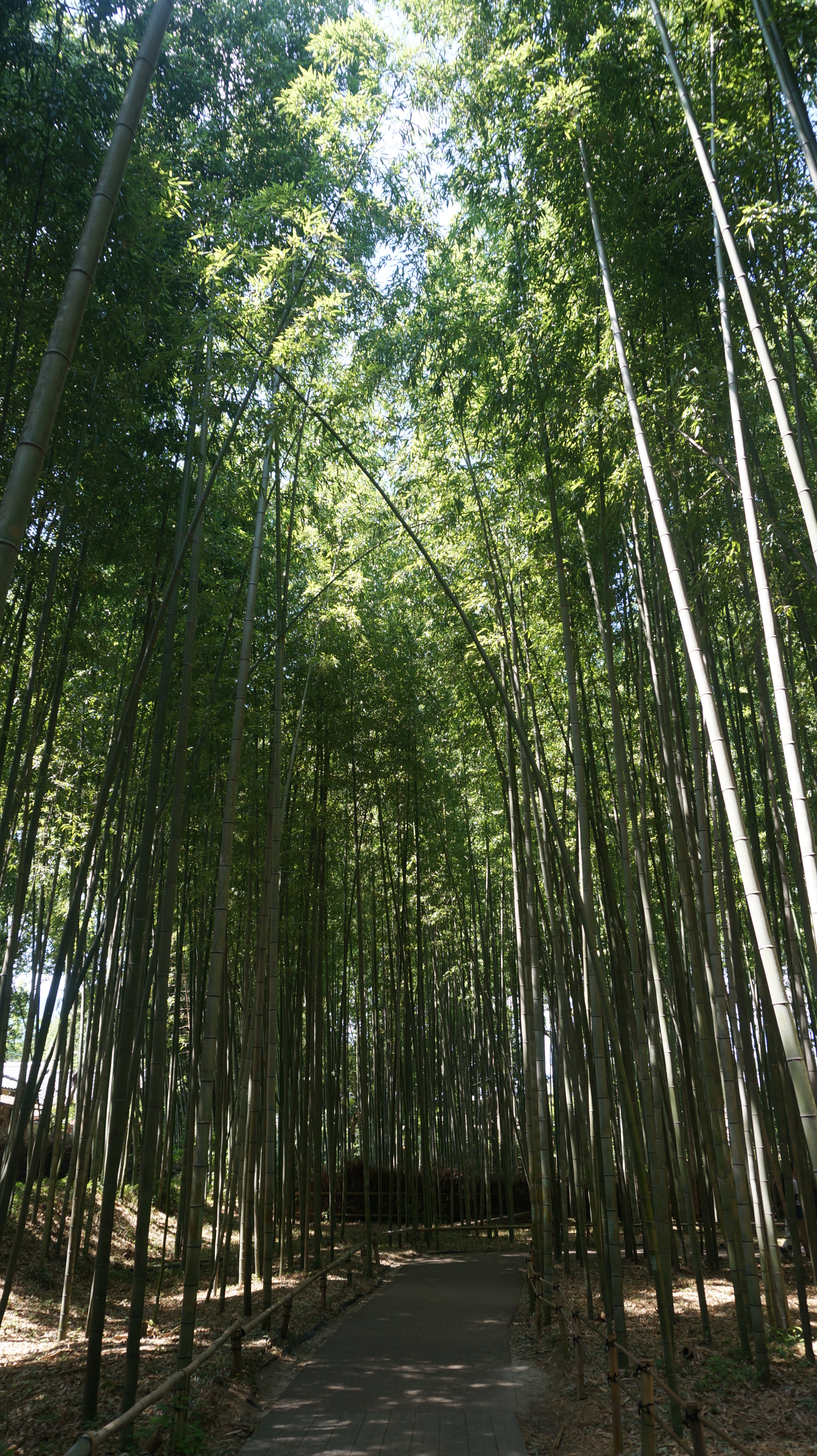 日本京嵐山竹林